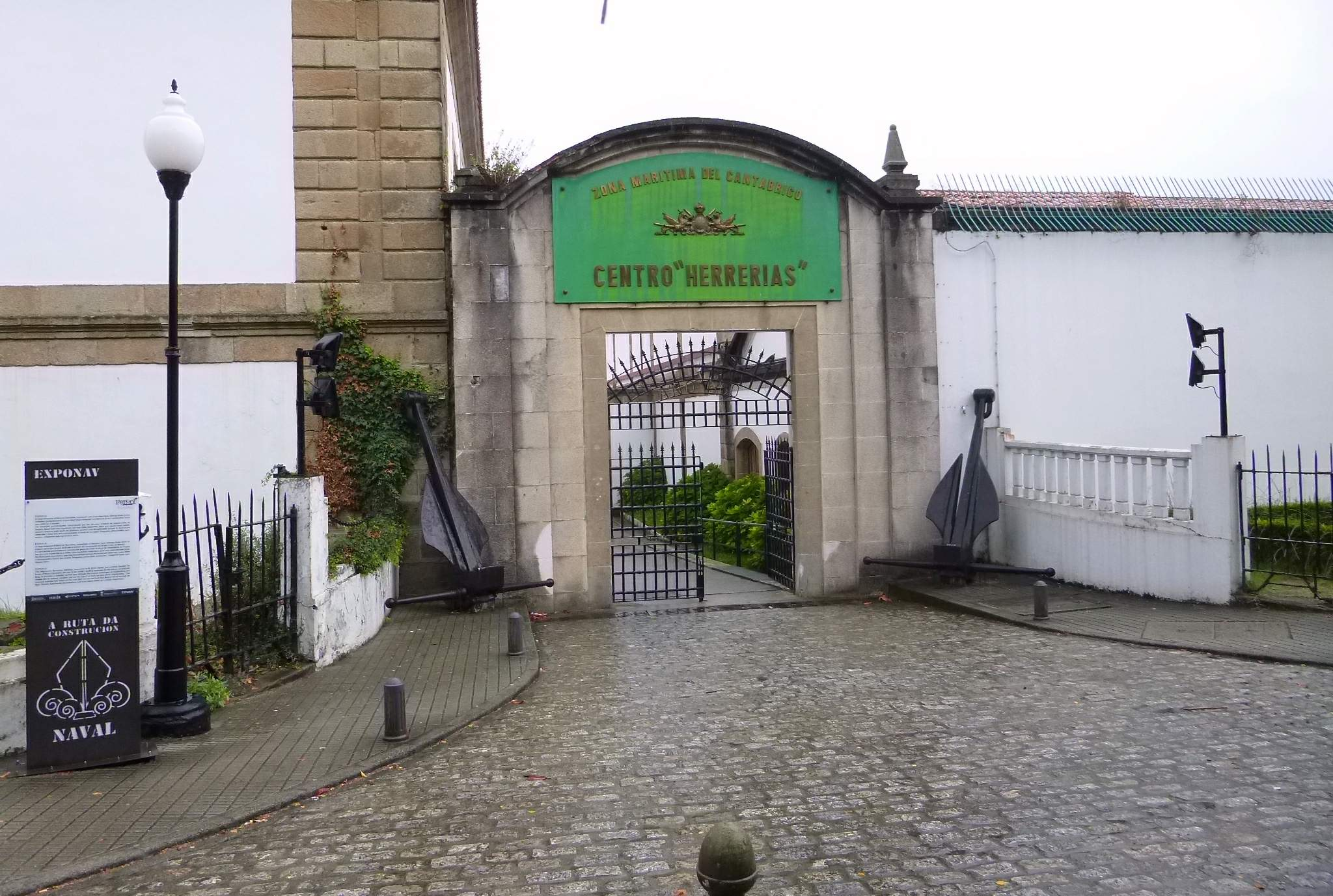 Exponav (Centro Herrerías) y Museo Naval, en el Arsenal de Ferrol (provincia de A Coruña, Galicia, España)